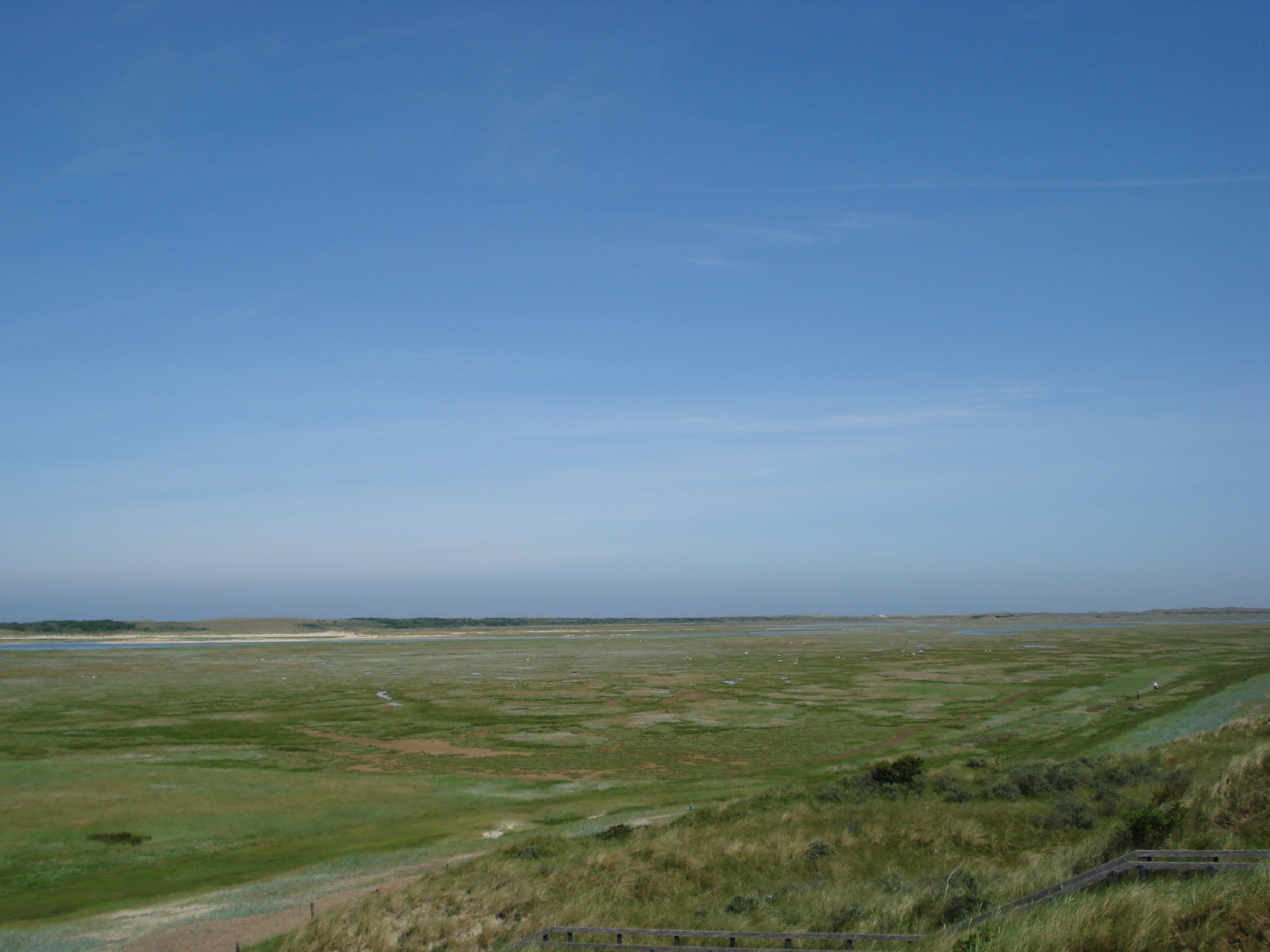 Foto van Texels landschap